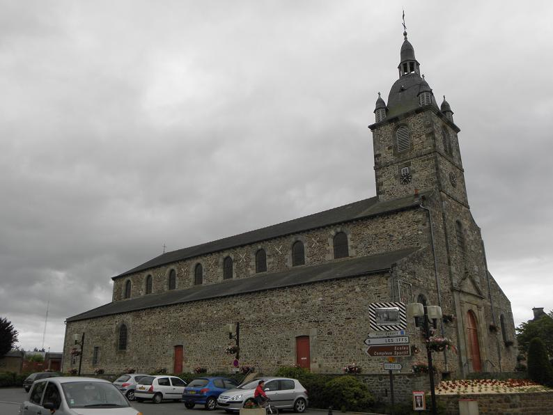 Église Saint-Pierre d'Irodouër (35).